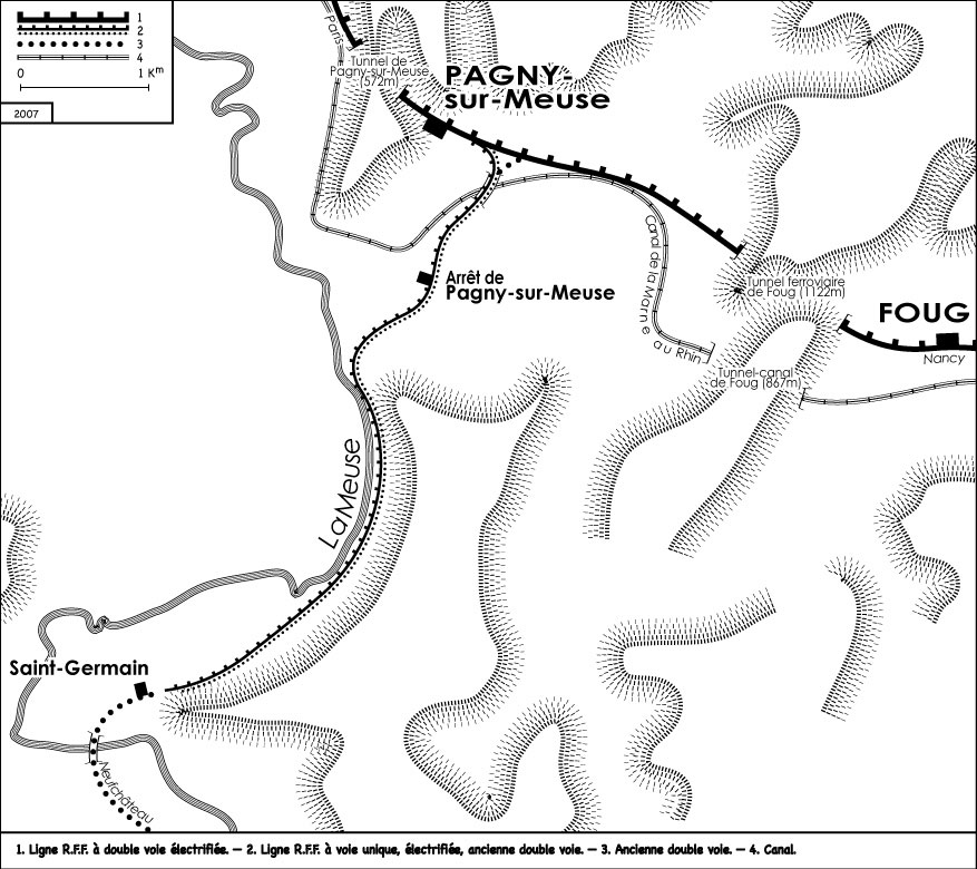 Schéma du complexe ferroviaire de Foug-Pagny-sur-Meuse (FR-54)